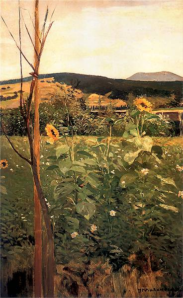 Jacek Malczewski (1854-1929) – polski malarz symbolista.